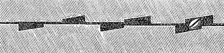 Жёрнов в боковом разрезе